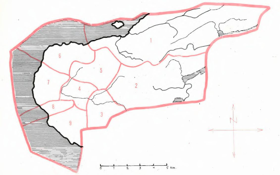 Kart over Skatval kommune ifm. folketellingen i 1960. Grunnkretser inntegnet: Langstein Vassbygda Vold Mæhre Forbord Alstad Drægset Auran Vinge